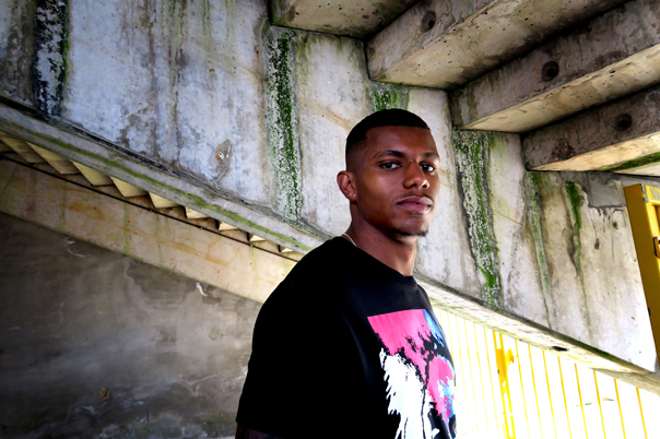 Wesley Moraes Ferreira da Silva